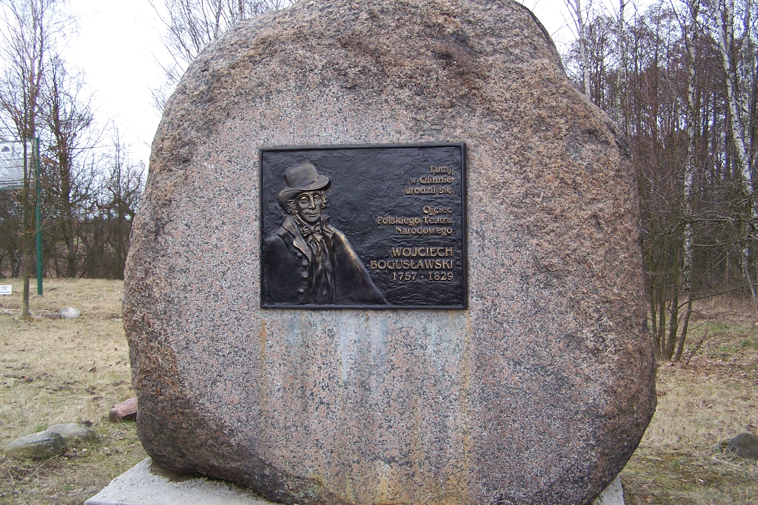 Głaz pamiątkowy w miejscu urodzenia Wojciecha Bogusławskiego w Glinnie (powiat poznański). Autor tablicy - artysta rzeźbiarz Roman Kosmala - Prezes Wielkopolskiego Związku Artystów Rzeźbiarzy